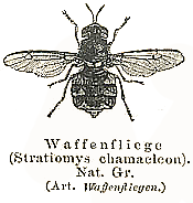 Waffenfliege Stratiomys chamaeleon